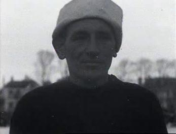 Abe de Vries in 1933